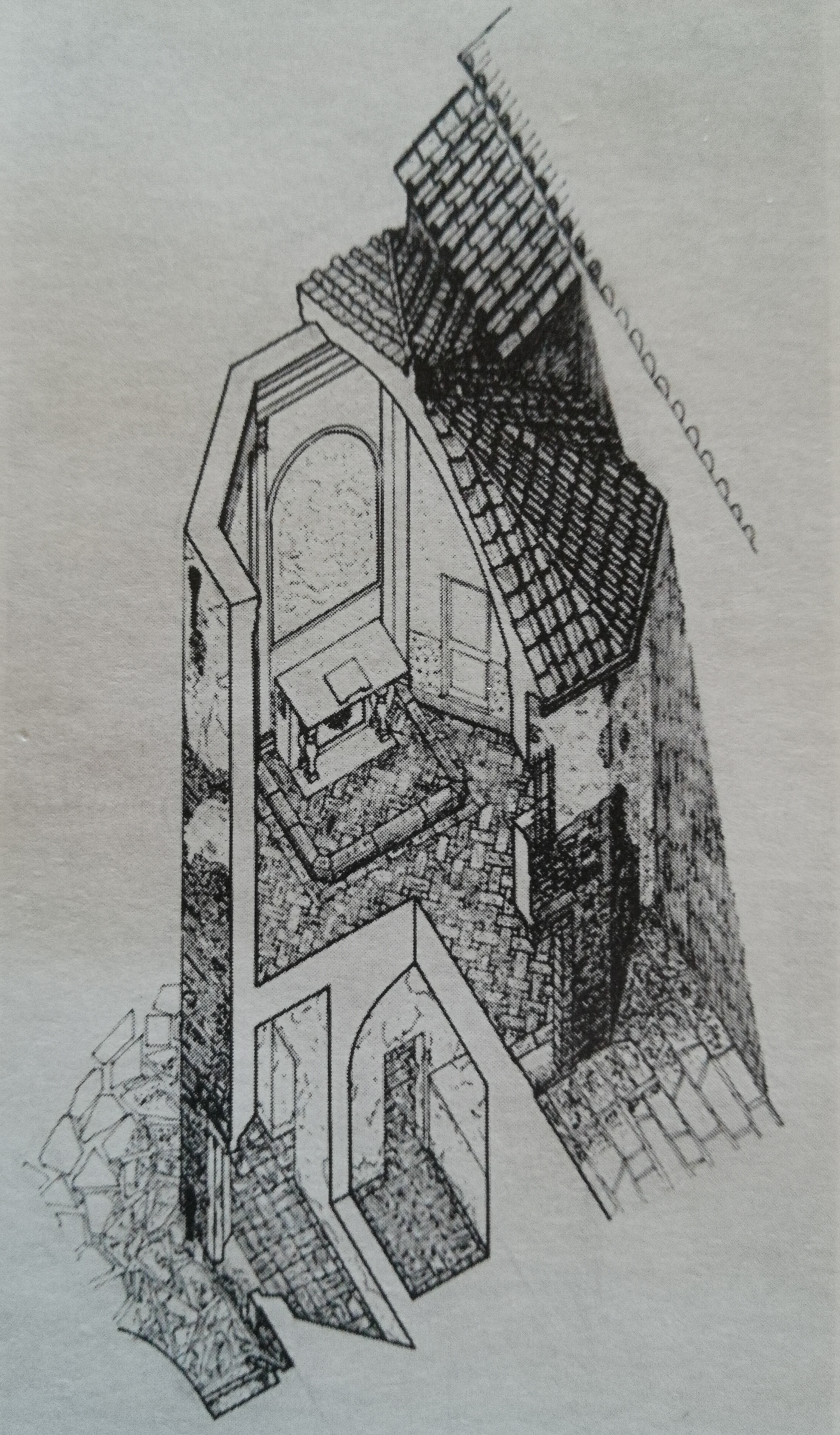 Spaccato assonometrico dell'oratorio della santissima trinità della villa di Spoiano